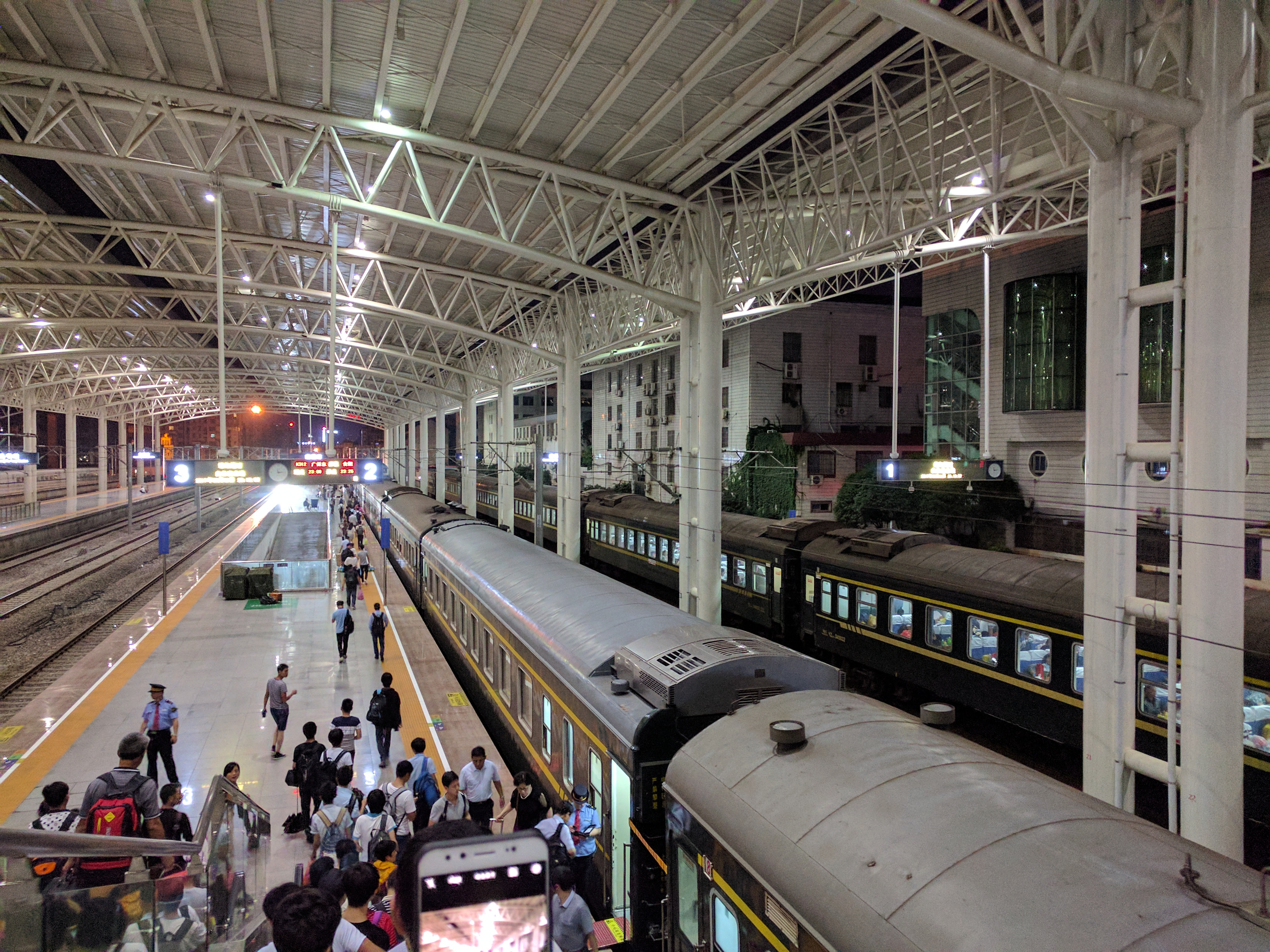 南昌站2/3站台，朝南拍摄。